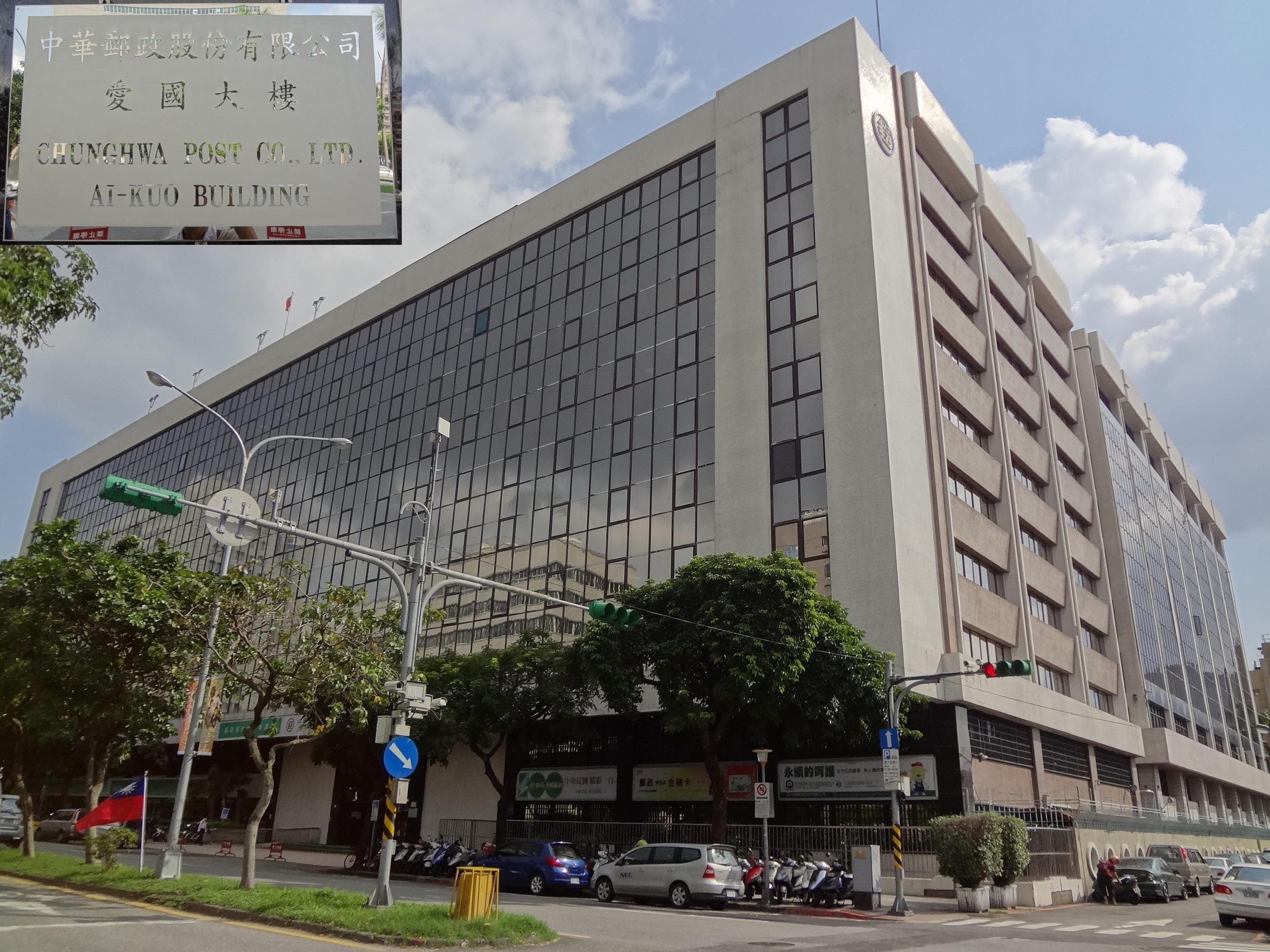 中華郵政愛國大樓，地址：臺北市大安區愛國東路216號。